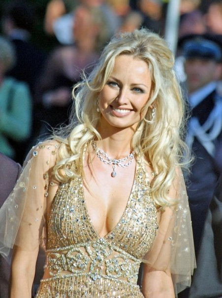 Adriana Karembeu au festival de Cannes